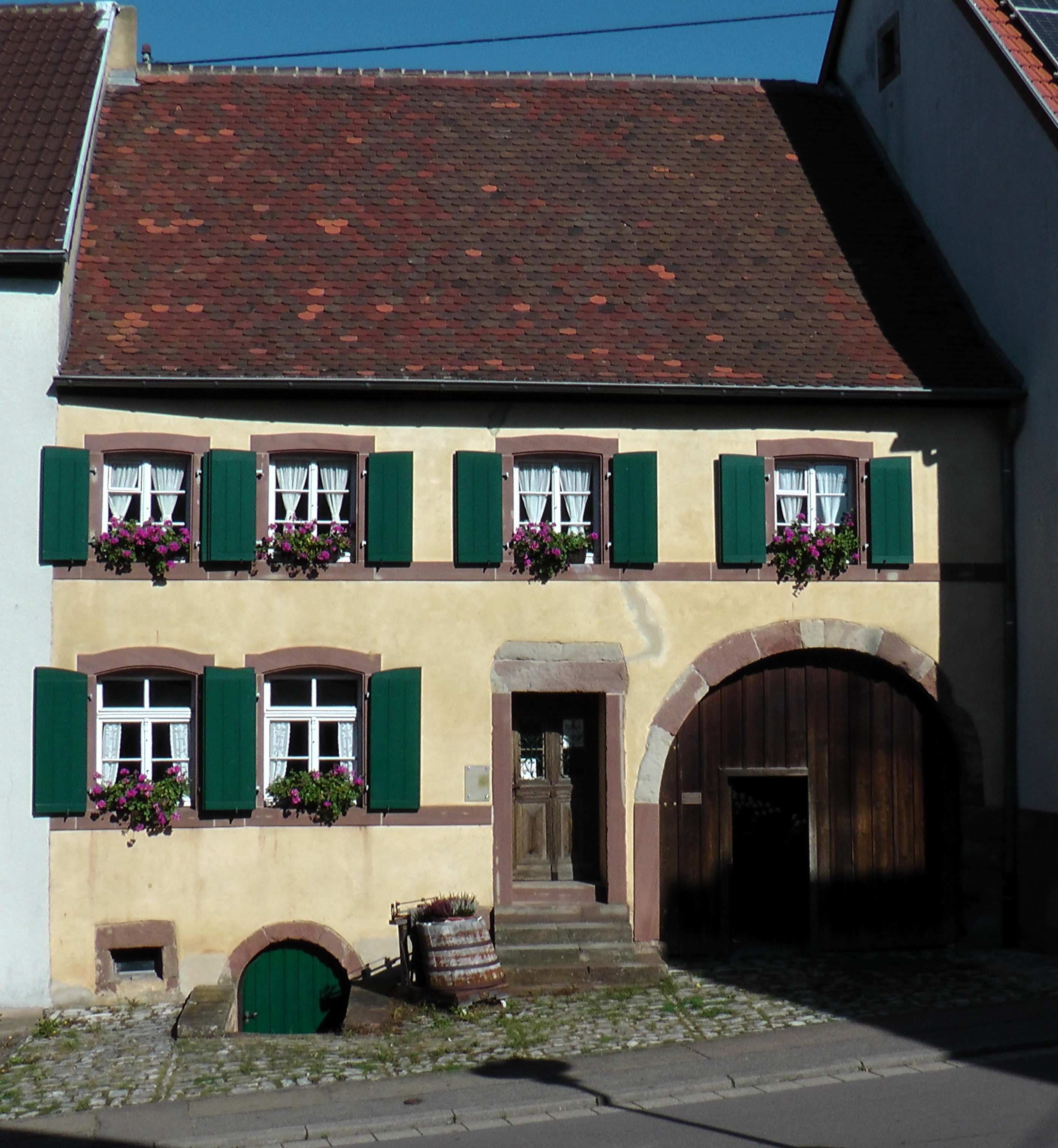 Denkmalgeschütztes Bauernhaus in Auersmacher Sankt Barbara Strasse 15